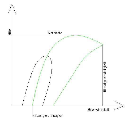 Flightenveloppe de